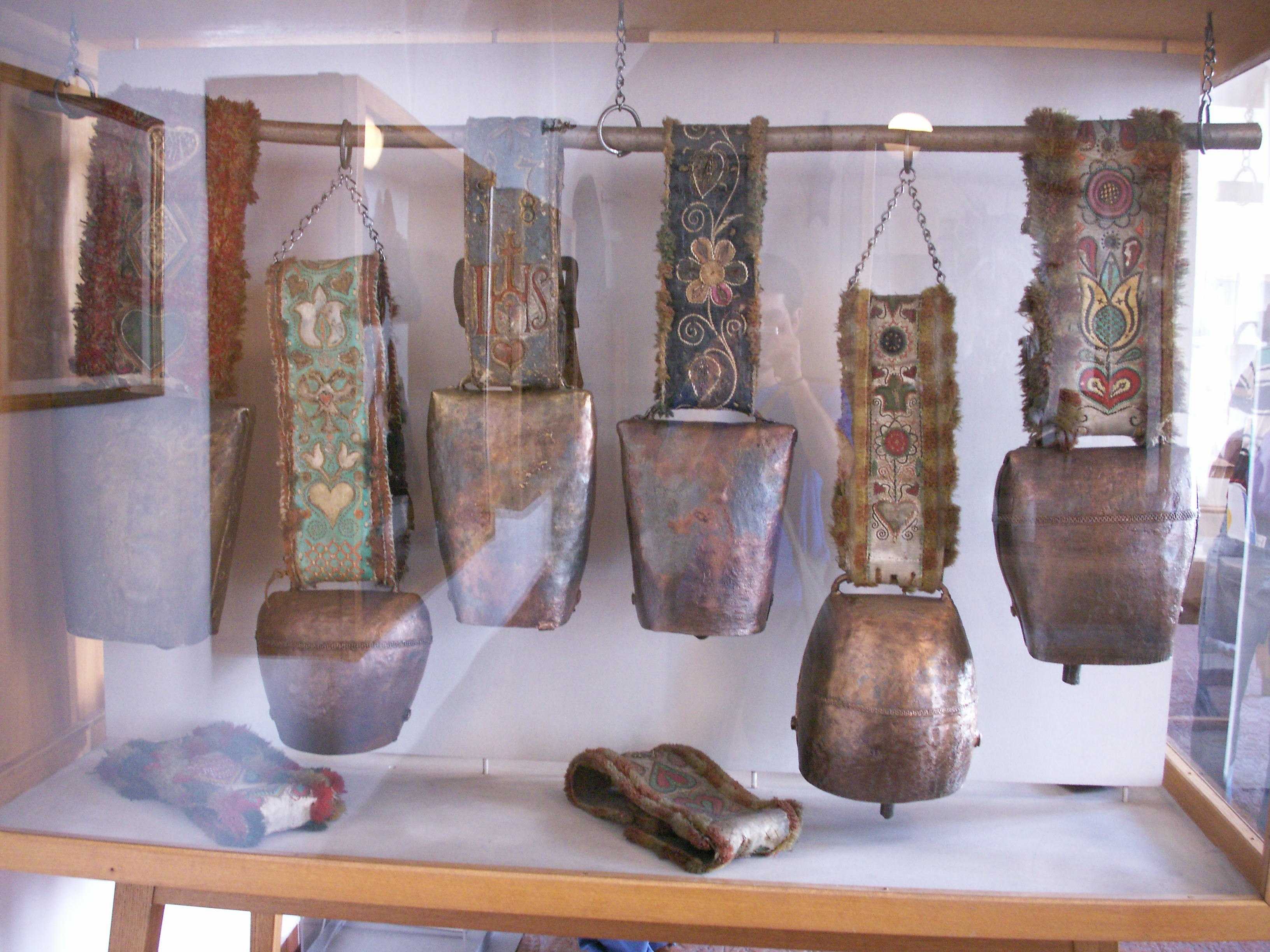 Viehglocken